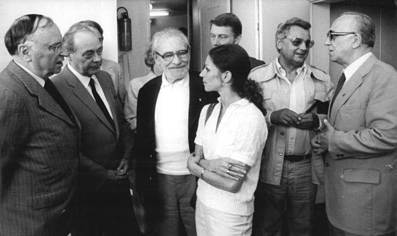 ADN-ZB Rehfeld 5.6.80 Berlin: Am IV. Kongreß des Verbandes der Theaterschaffenden nehmen Mitglieder des Politbüros des ZK der SED teil. In einer Beratungspause unterhielten sich die Gäste mit Künstlern - v.l.n.r.: Kurt Hager, Harry Tisch, Prof. Wolfgang Heinz, Monika Lubitz, Dr. Horst Seeger (Hintergrund), Horst Drinda und Horst Sindermann.